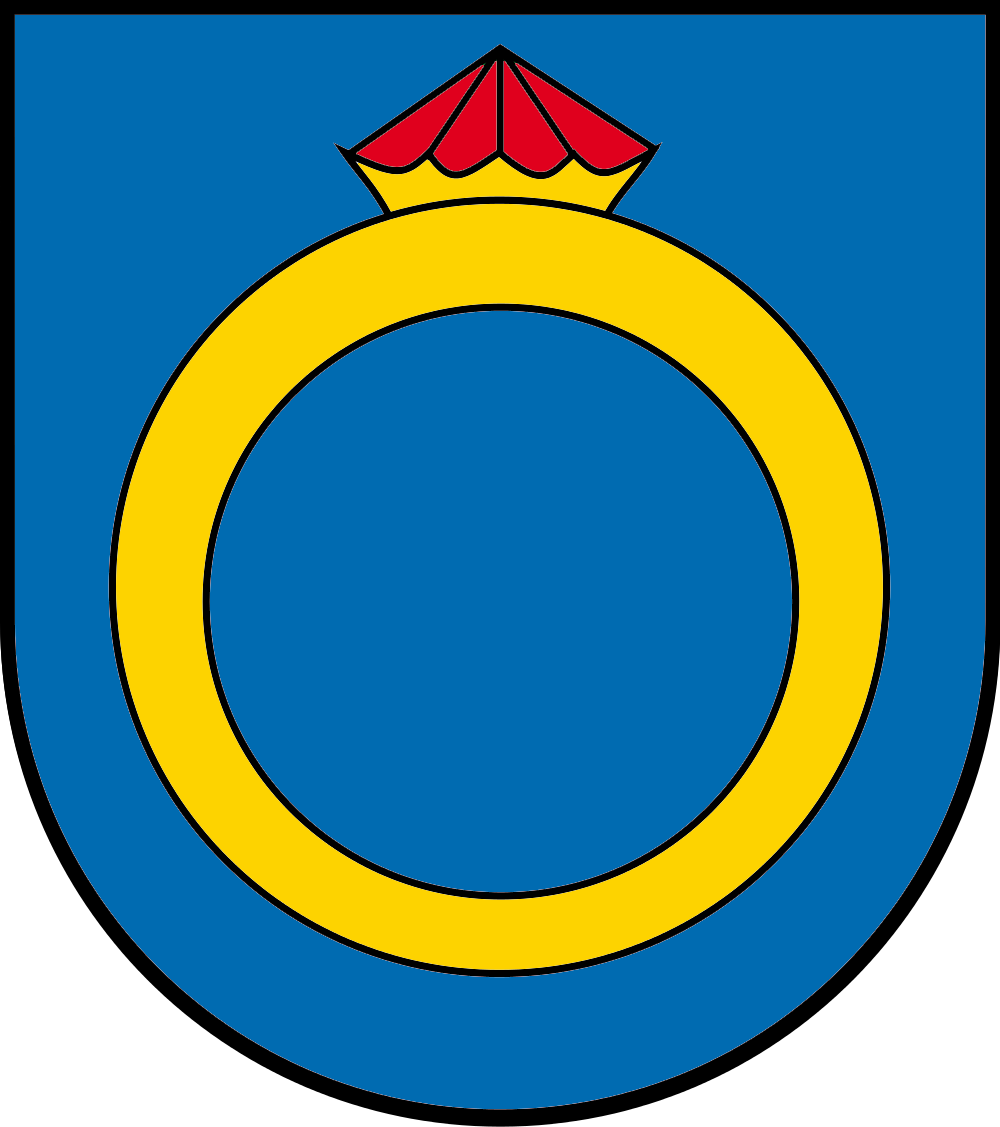 Reduziertes Familienwappen der edelfreien Herren von Dürrmenz, wappengleich mit den stammesverwandten Herren von Enzberg und von Niefern; es zeigt einen goldenen Ring mit einem roten Stein besetzt, der nach oben ausgerichtet ist, auf blauem Grund.